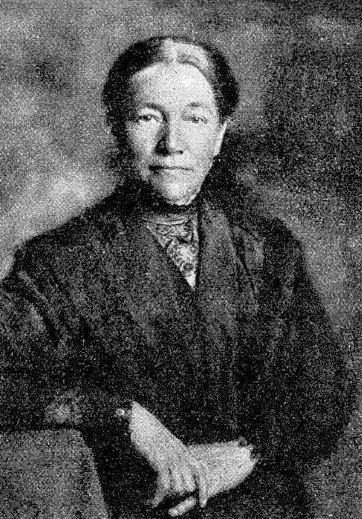 Anna Heer (1863–1918) Ärztin. Fotografie von G.Ruf, Zürich